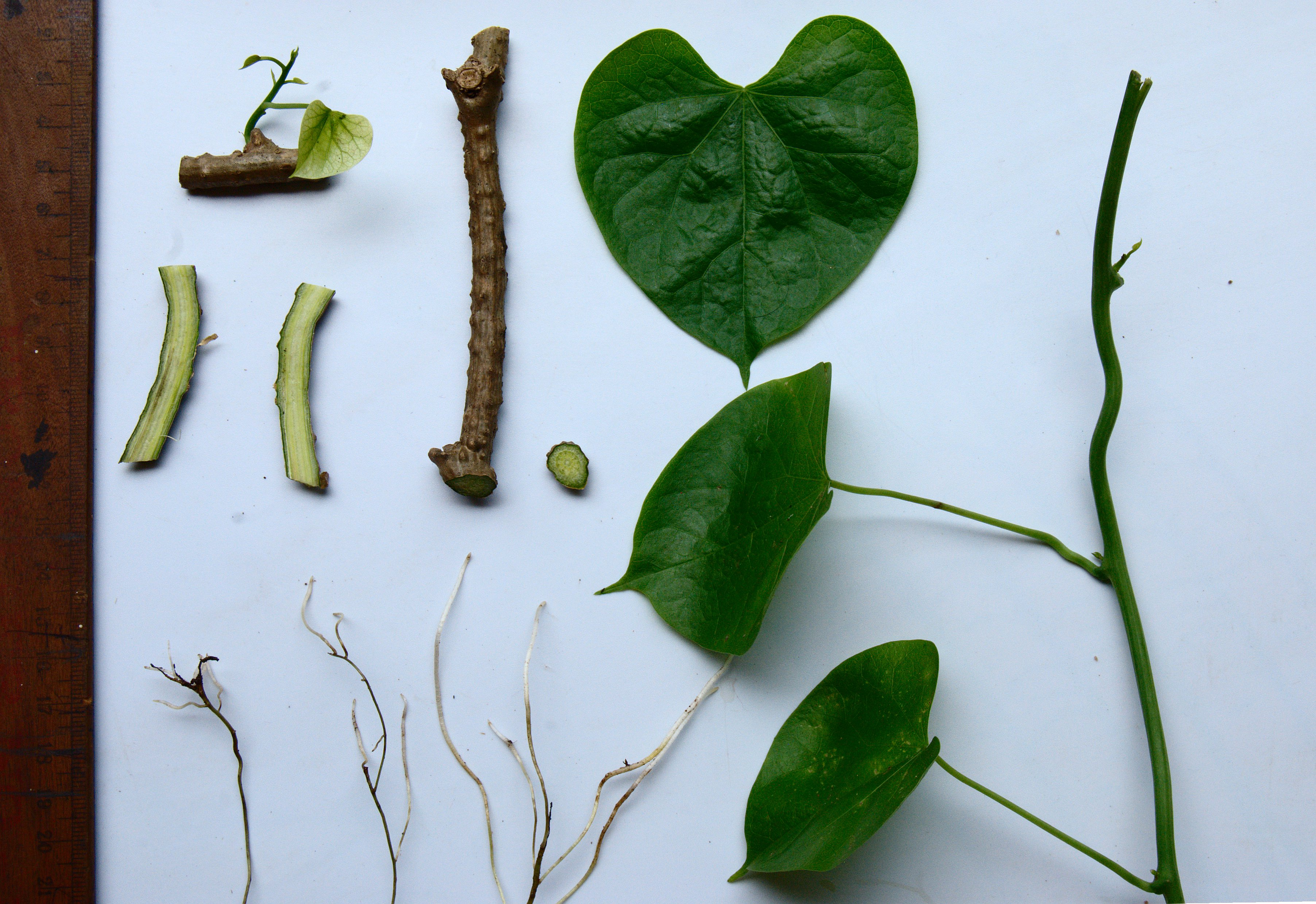 അമൃത്